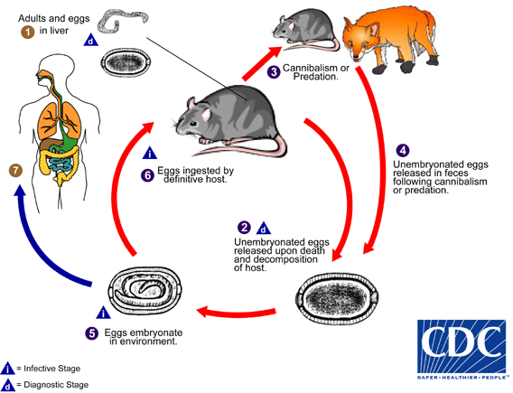 Capillaria hepatica = Calodium hepaticum lifecycle